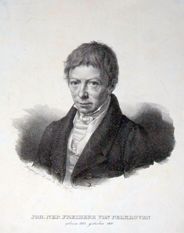 Johann Nepomuk Freiherr von Pelkoven (1763-1830). Lithographie von Franz Seraph Hanfstaengl.